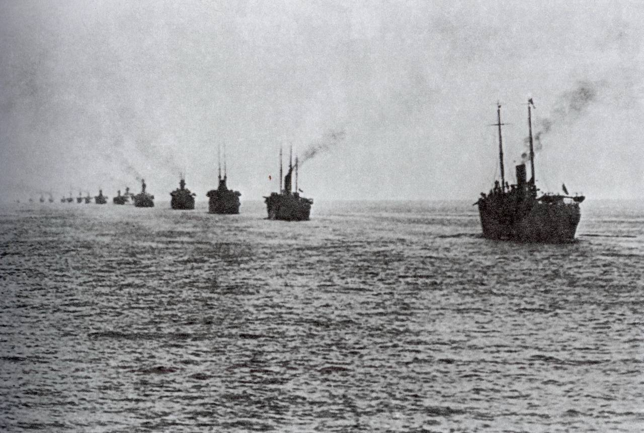 Эвакуация врангелевской армии из Крыма.